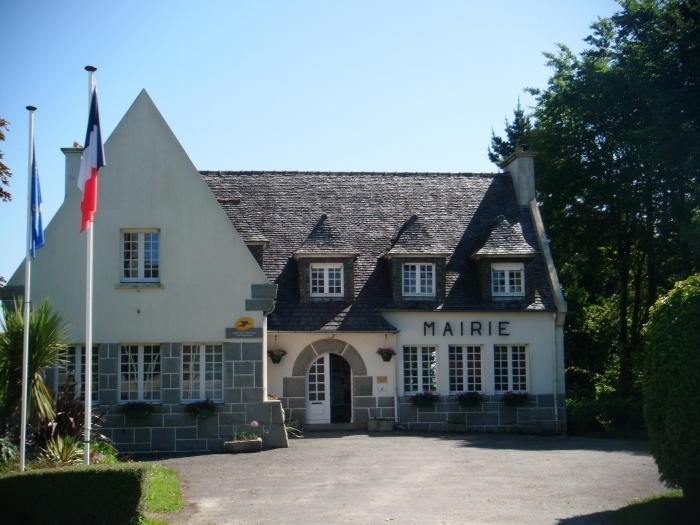 Mairie de Commana